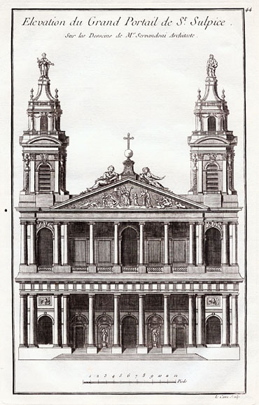 Projet pour la façade de l'église Saint-Sulpice